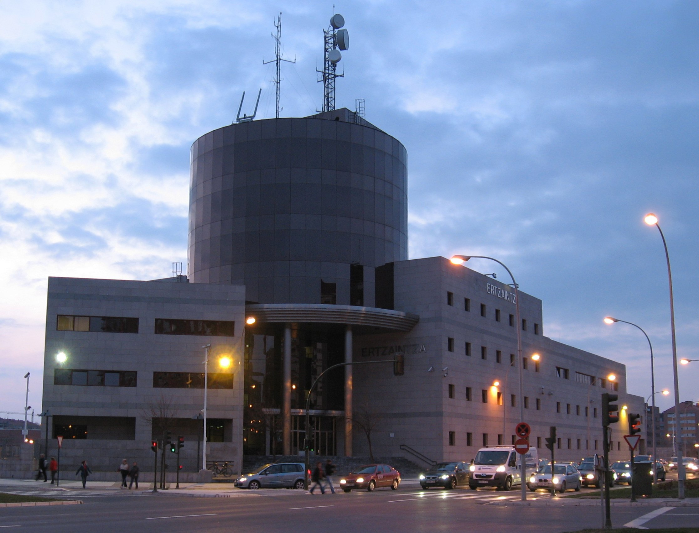 Desc: Ertzaintza (Basque Police) Station at Vitoria-Gasteiz